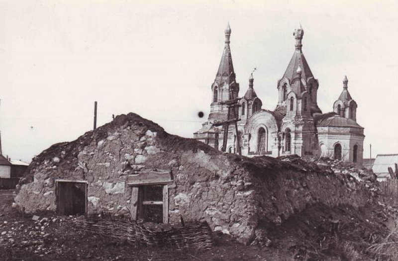 Область Войска Донского, Второй Донской округ, станица Голубинская, Николаевская церковь (1920-е годы).